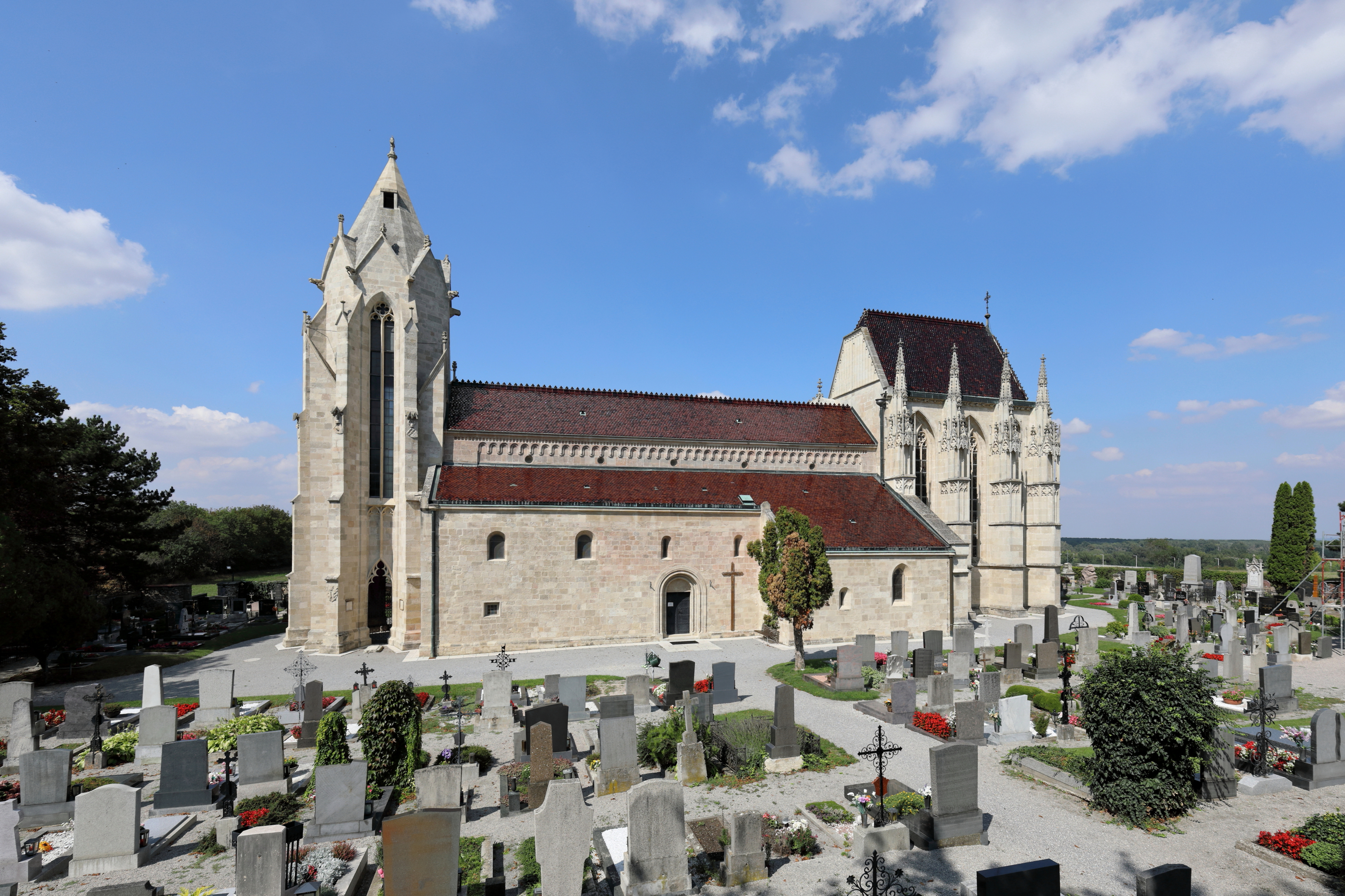 Südsüdostansicht der Pfarr- und Wallfahrtskirche Mariae Himmelfahrt in der niederösterreichischen Marktgemeinde Bad Deutsch-Altenburg. Die Kirche wurde erhöht über dem Ort auf einer zur Donau steil abfallenden Terrasse errichtet und ist vom Friedhof und einer Umfassungsmauer aus Bruchsteinen umgeben. Das Langhaus ist eine romanische, dreischiffige und sechsjochige Pfeilerbasilika. Der vorgestellte hochgotische Turm im Westen stammt aus dem 3. Viertel des 14. Jahrhunderts. Der erhöhte, zweijochige gotische Chor wurde vermutlich vom Baumeister Michael Knab Ende des 14. Jahrhunderts errichtet. Insgesamt ist das Bauwerk ein bedeutendes Denkmal mittelalterlicher Architektur in Österreich.